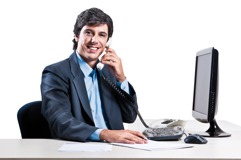 Azzu - Tecnologia Banda Larga.